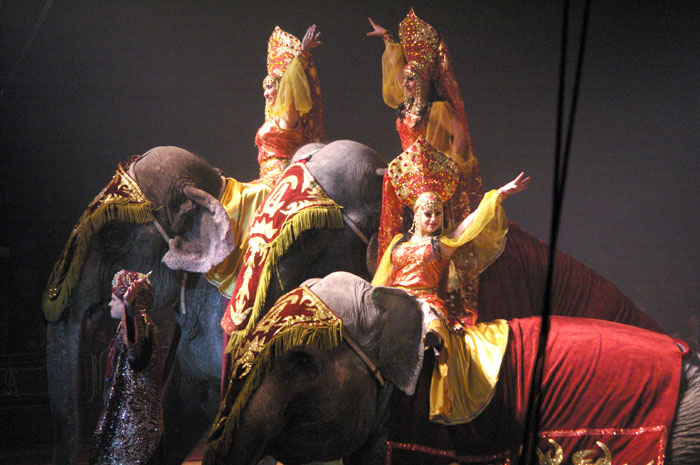 Elefantes en Circo Americano